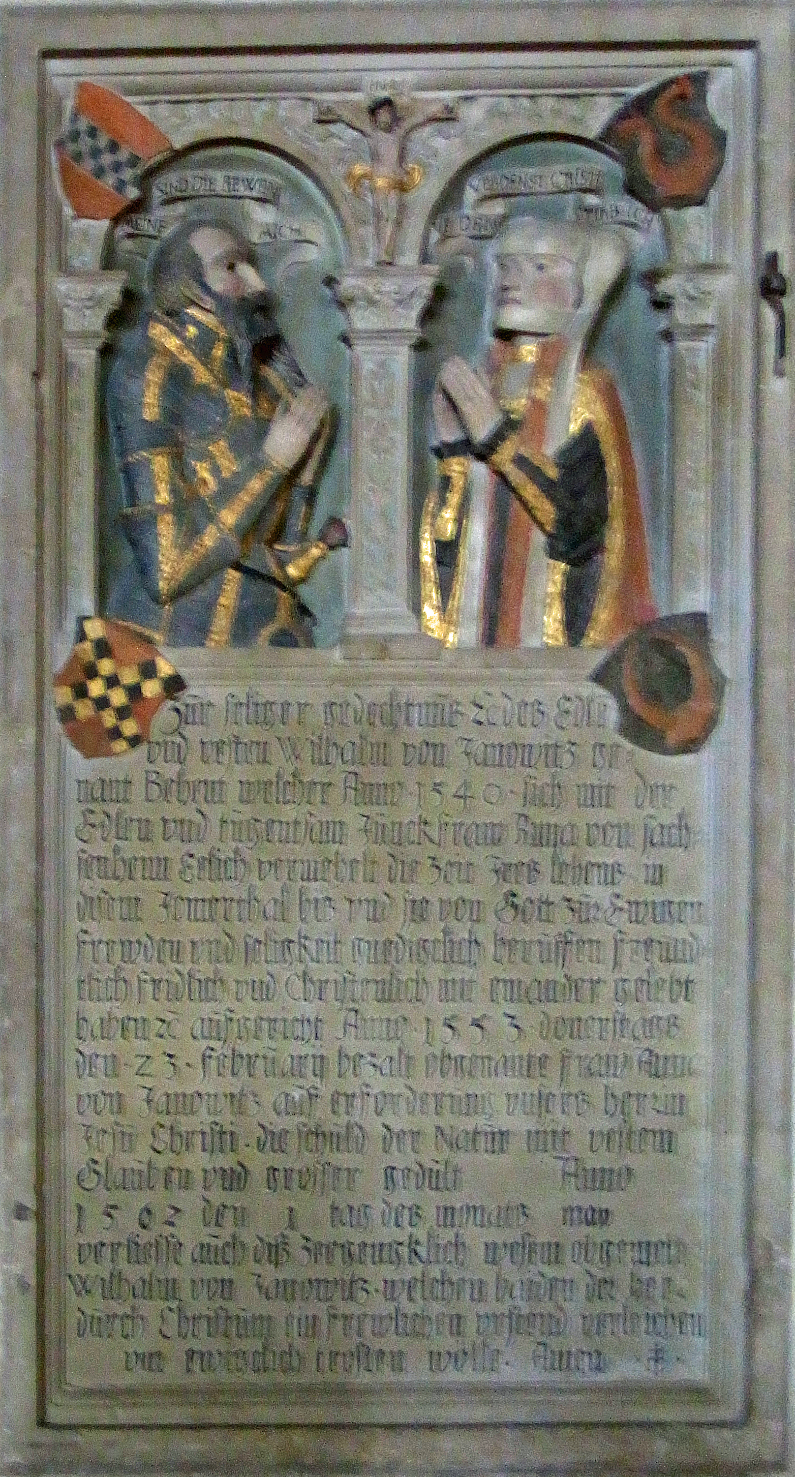 Stiftskirche St. Georg, Tübingen Wilhelm von Janowitz (1489 - 1562) und Anna von Sachsenheim († 1553), mit Wappen Janowitz und Sachsenheim sowie zwei Ahnenwappen, (optisch) links "In rot ein schwarz-golden geschachtes Andreaskreuz" (Krinitz von Kriniow = Chřínovci z Chřínova ?), rechts wohl wiederum Sachsenheim